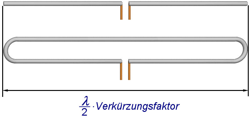 Einfache Dipolantenne (oben) und Faltdipol (unten)